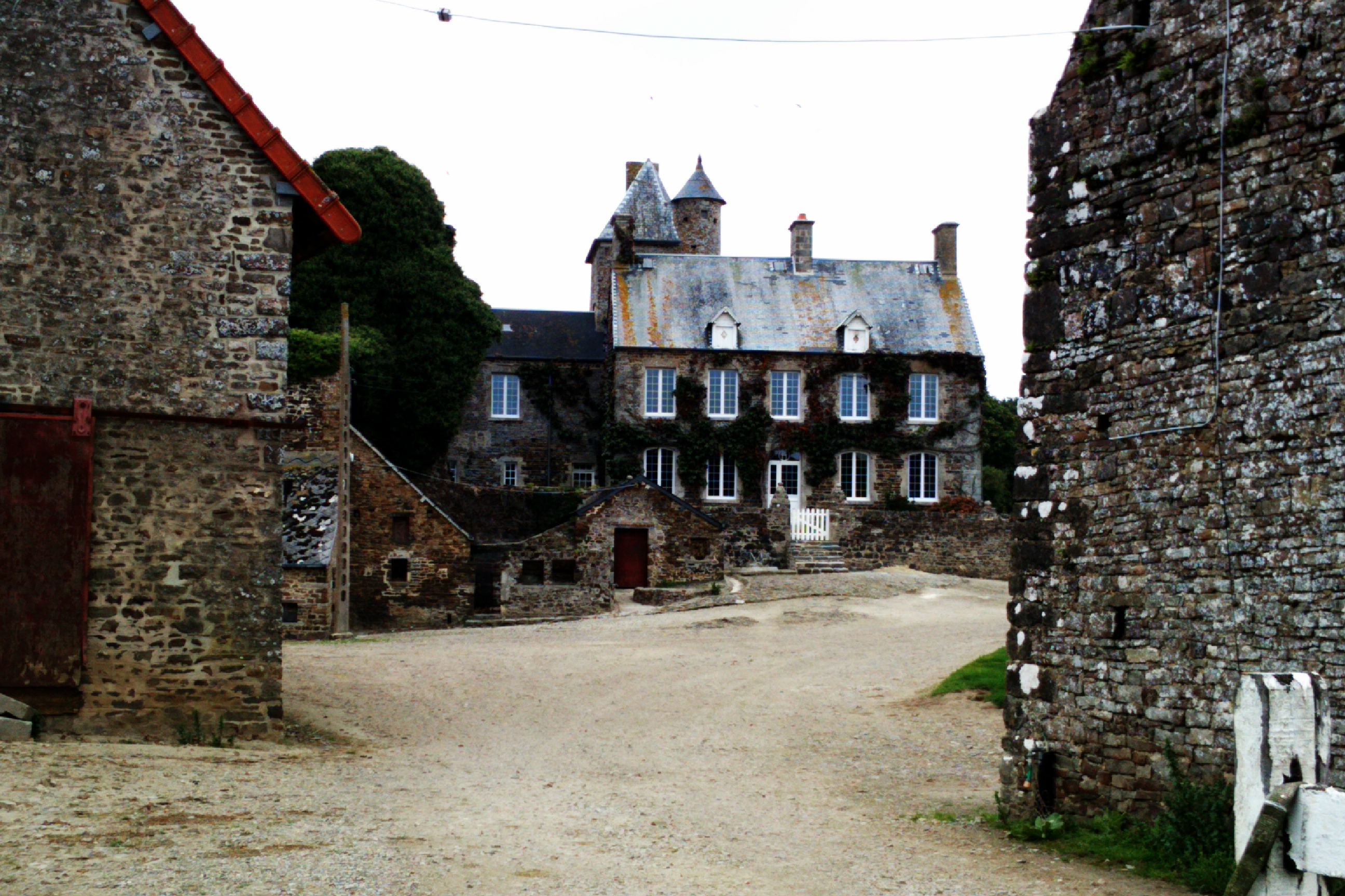 Château d'Olonde à Canville-la-Rocque .